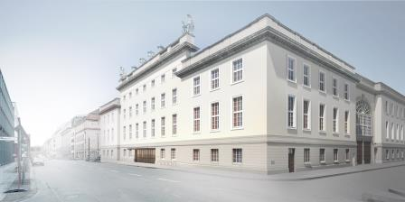 Außenansicht der Barenboim-Said Akademie